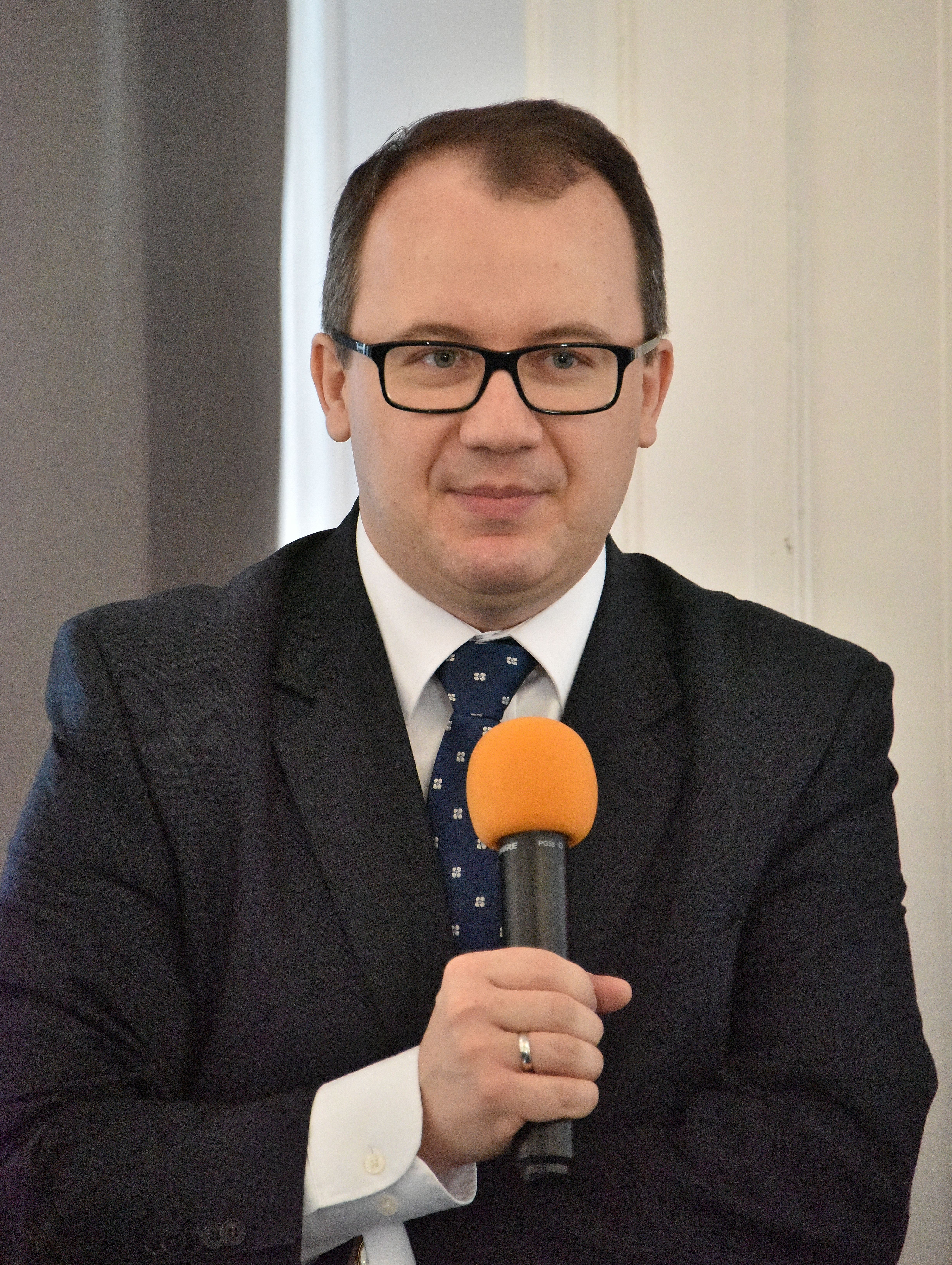 Rzecznik Praw Obywatelskich Adam Bodnar podczas dnia otwartego z RPO "Otwarci na Konstytucję" w siedzibie Biura RPO przy ul. Długiej 23/25 w Warszawie